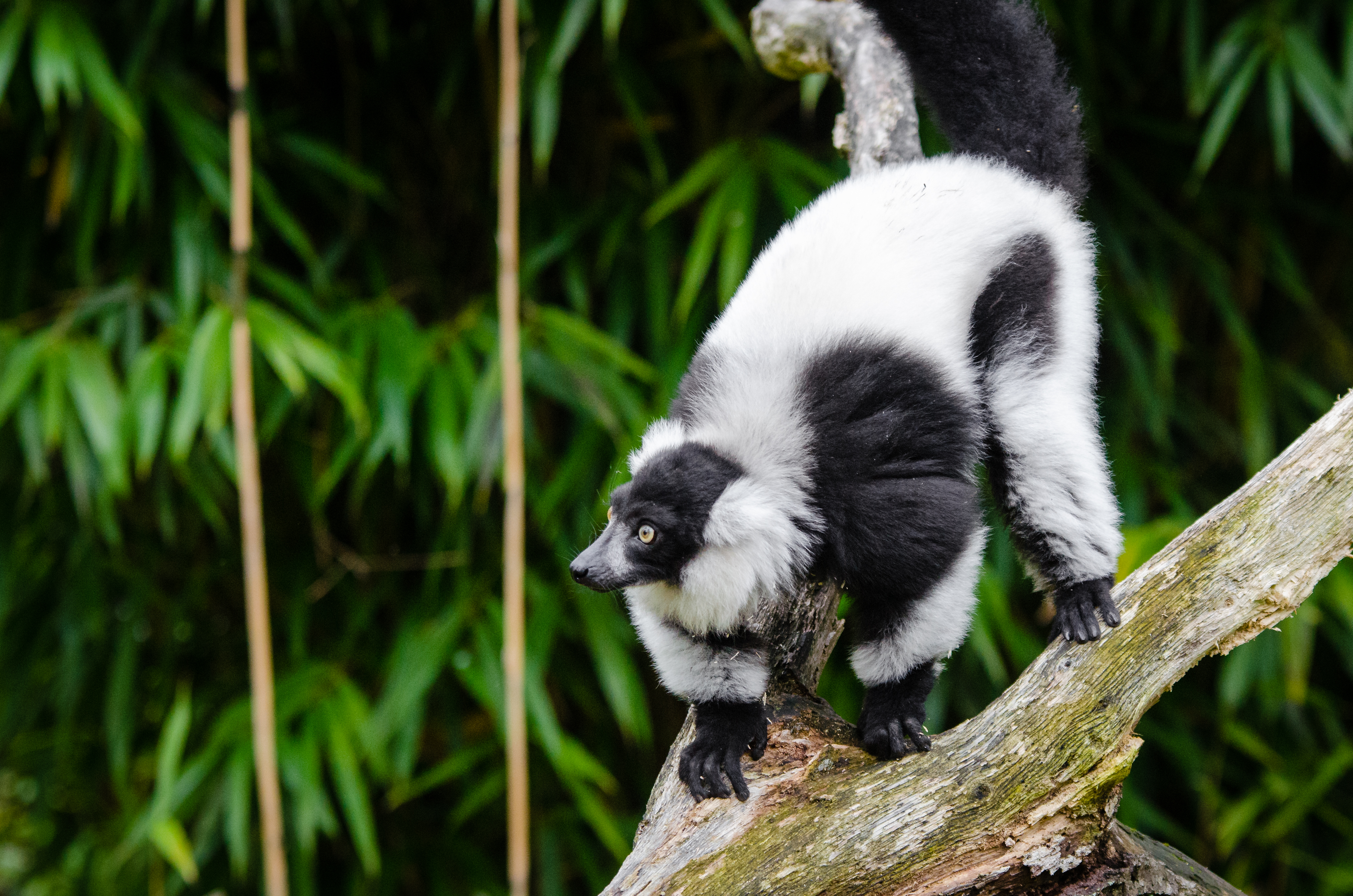 Lemur